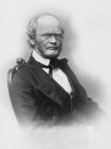 Baltisaksa mineroloog ja Siberi-uurija Alexander Gustav von Schrenk (1816–1876).